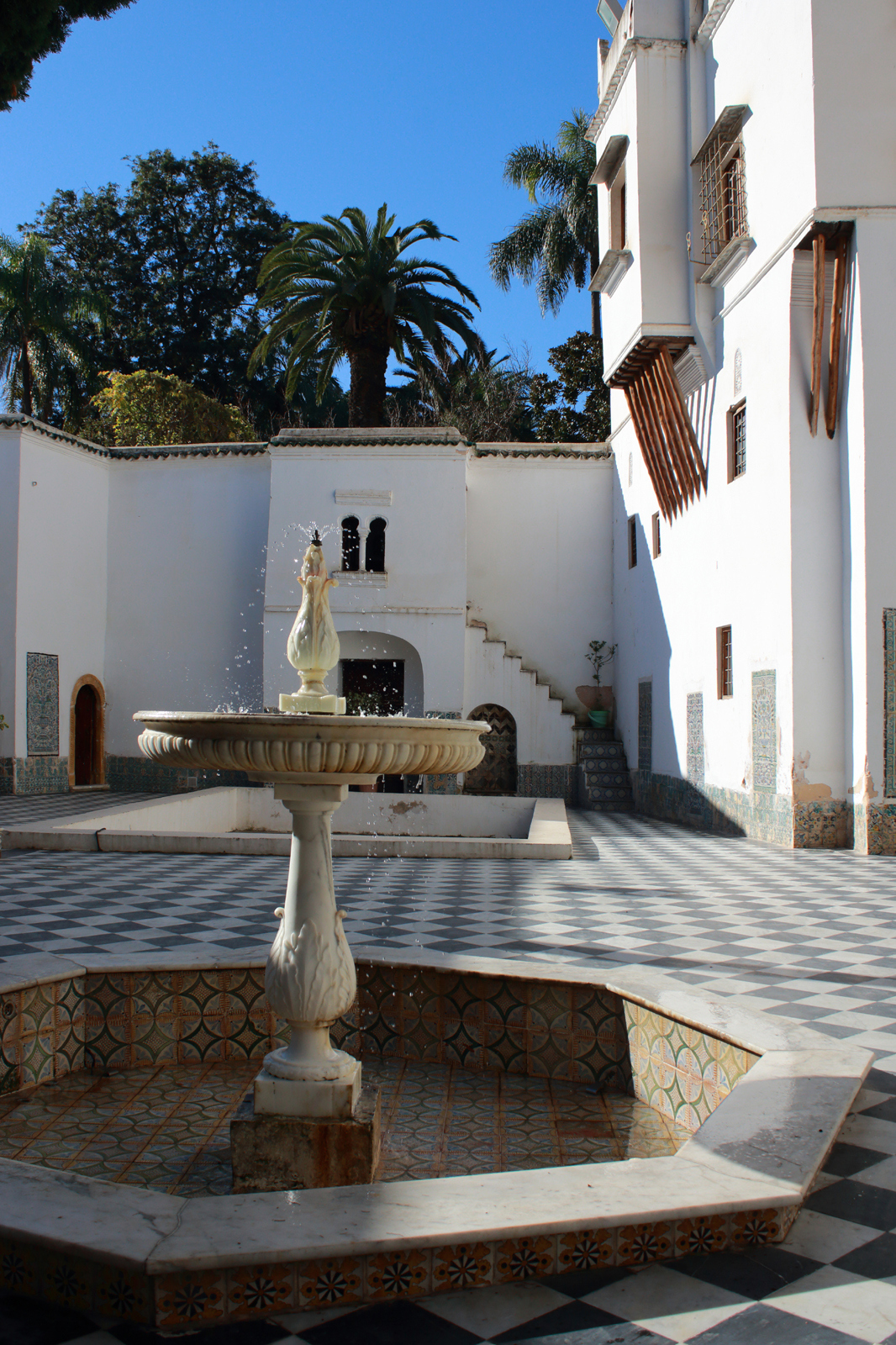 Musee Bardo à Alger